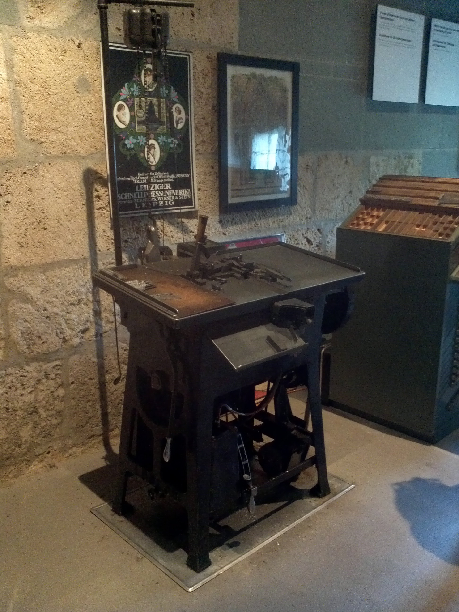 Ludlow Zeilengiessmaschine, Baujahr 1909 von William A. Reade (1866 - 1930) im Gutenberg Museum, Freiburg i. Üe.